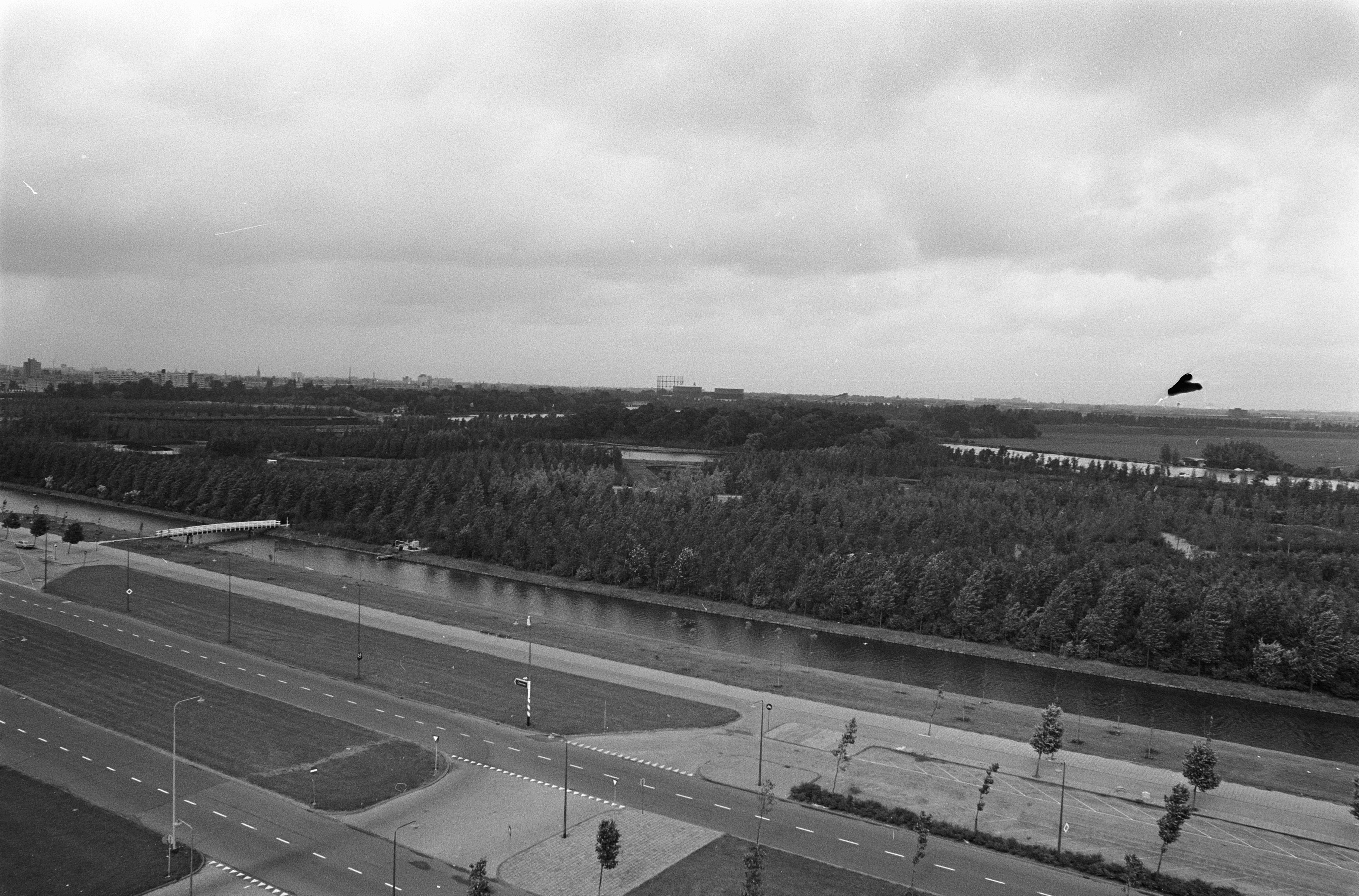 Collectie / Archief : Fotocollectie Anefo Reportage / Serie : [ onbekend ] Beschrijving : Park wordt aangelegd tussen Europaboulevard en Amstel o.a voor Floriade, Amsterdam. Datum : 15 juli 1970 Locatie : Amsterdam, Noord-Holland Trefwoorden : parken Persoonsnaam : Amstel Instellingsnaam : Floriade Fotograaf : Verhoeff, Bert / Anefo Auteursrechthebbende : Nationaal Archief Materiaalsoort : Negatief (zwart/wit) Nummer archiefinventaris : bekijk toegang 2.24.01.05 Bestanddeelnummer : 923-6722